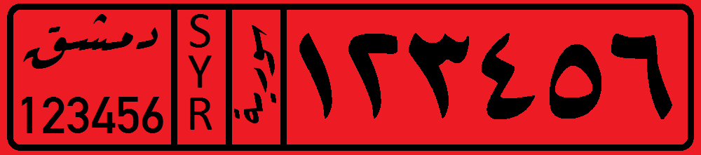 نمونه پلاک سوریه